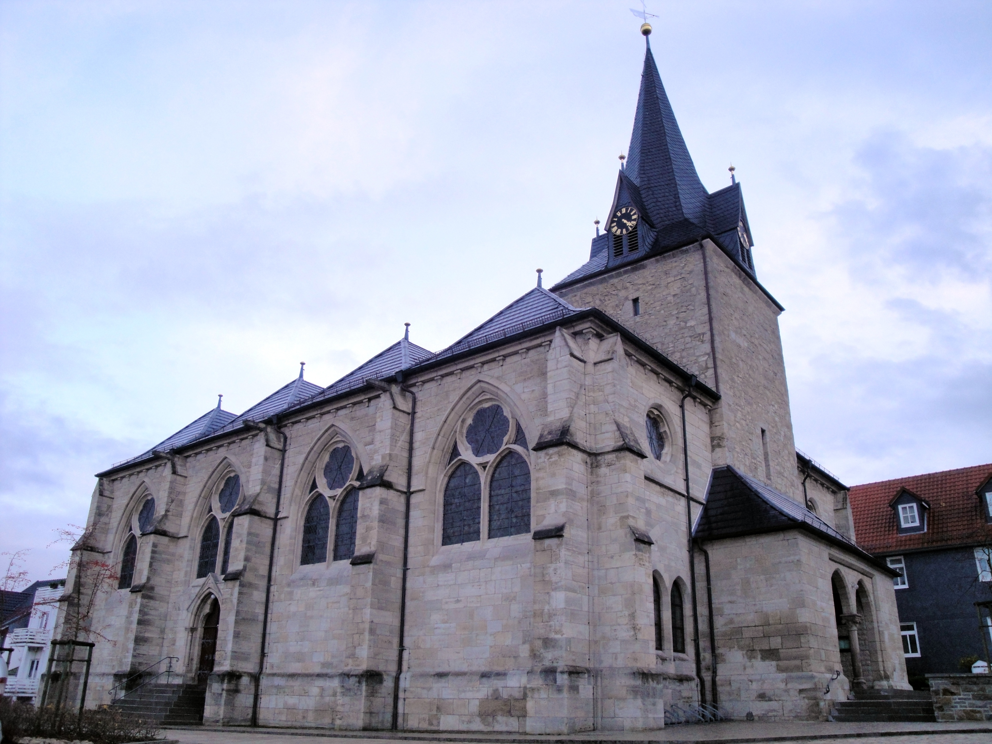 Katholische Pfarrkirche "St. Johannes der Täufer" in Birkungen im Eichsfeld